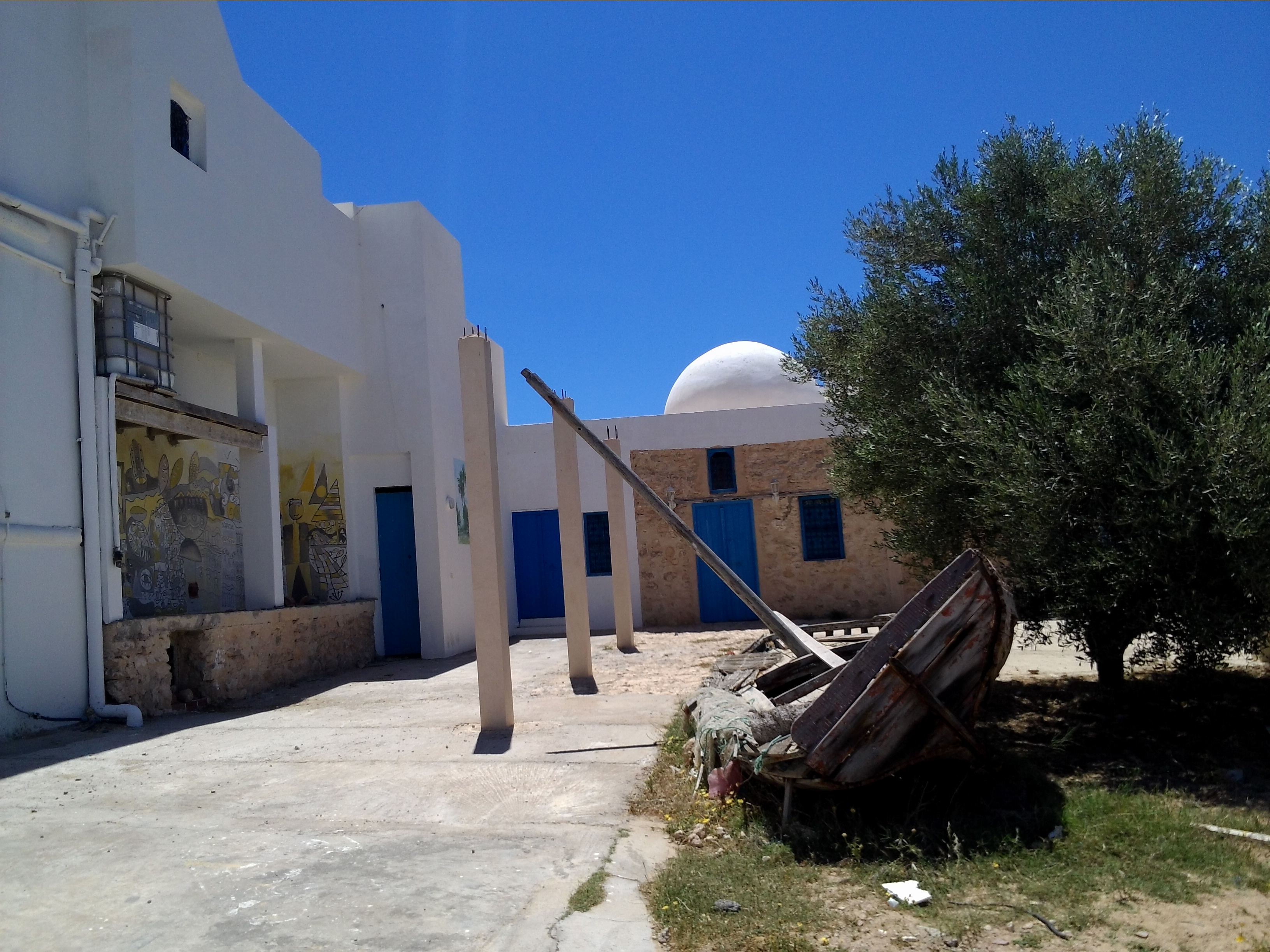 Музей на Керкенських островах